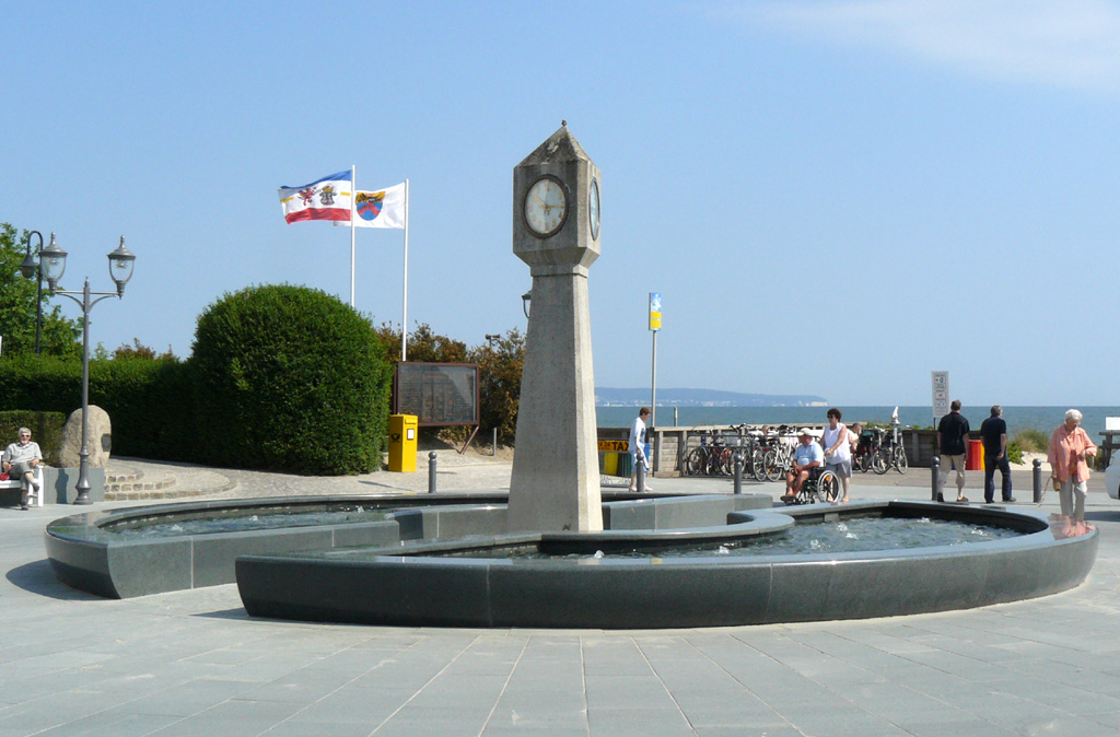 Neu gestalteter Wendepunkt am Ende der Hauptstraße in Binz auf Rügen / Deutschland